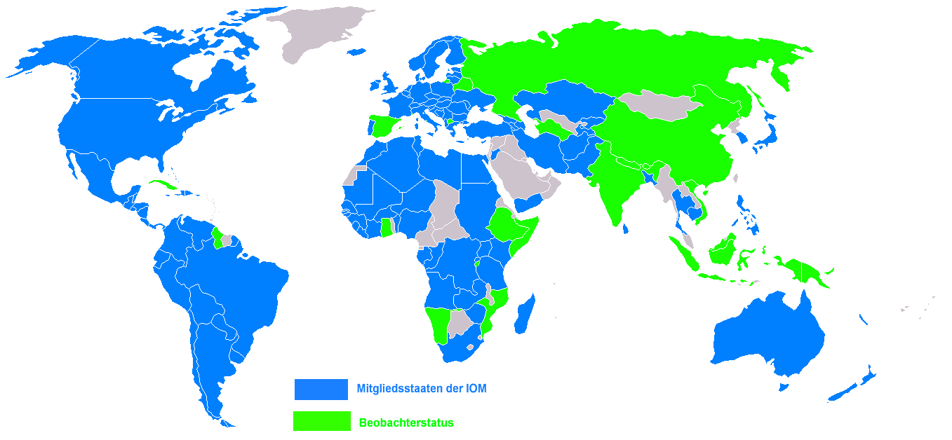 Mitgliedsstaaten der IOM